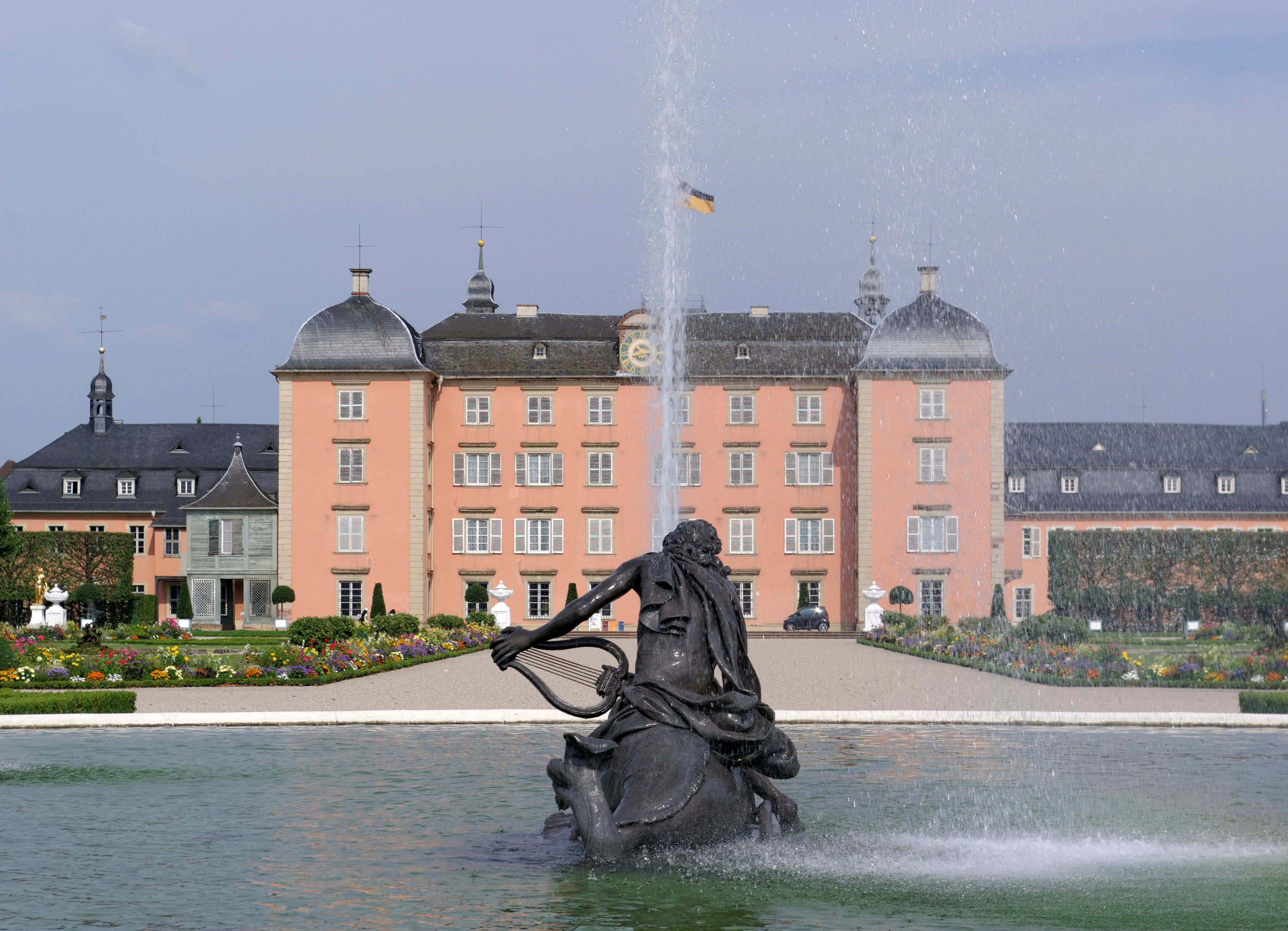 Schwetzingen, Schloß